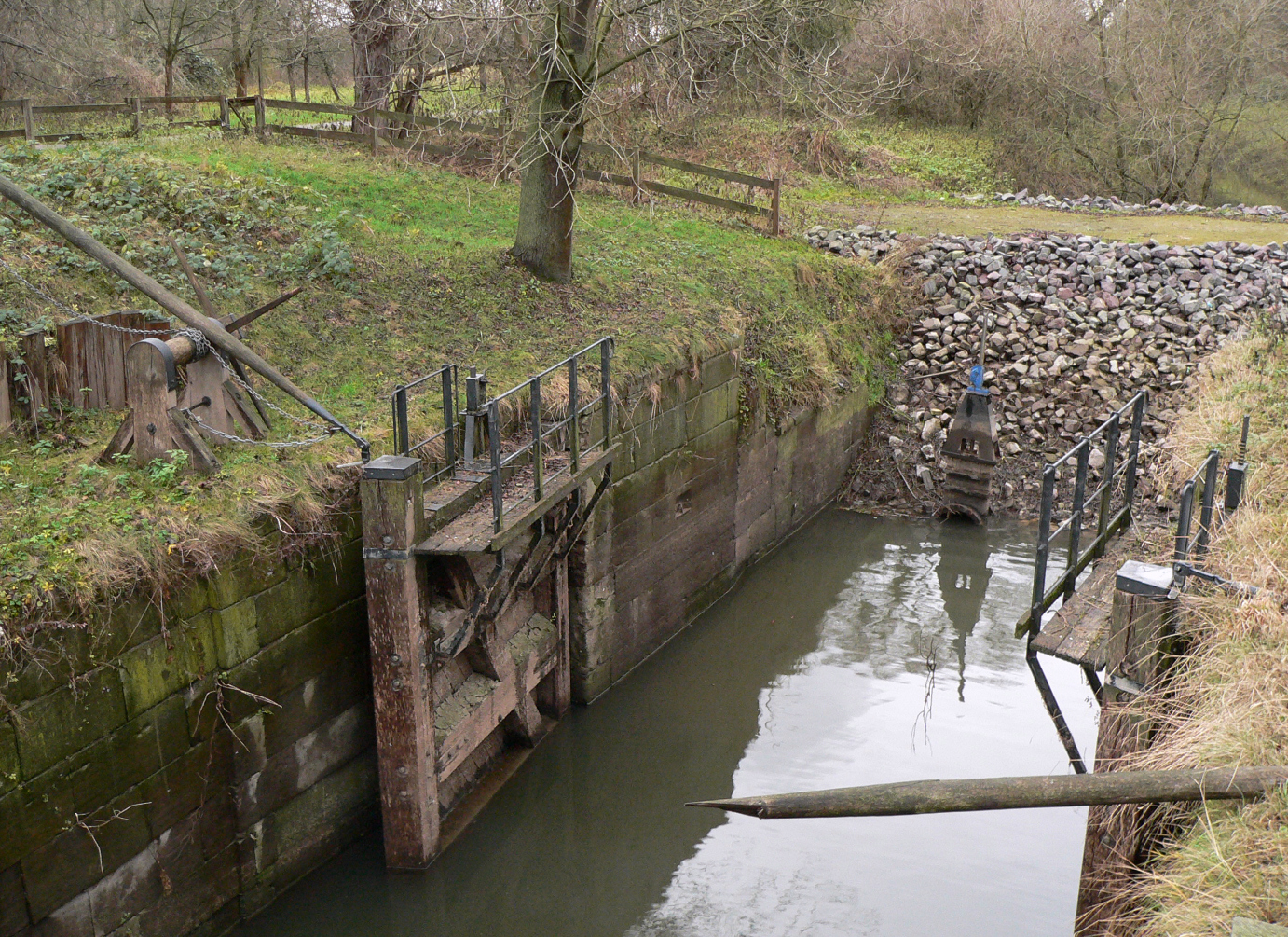 Ernst-August-Kanal, Schleusentor Nord